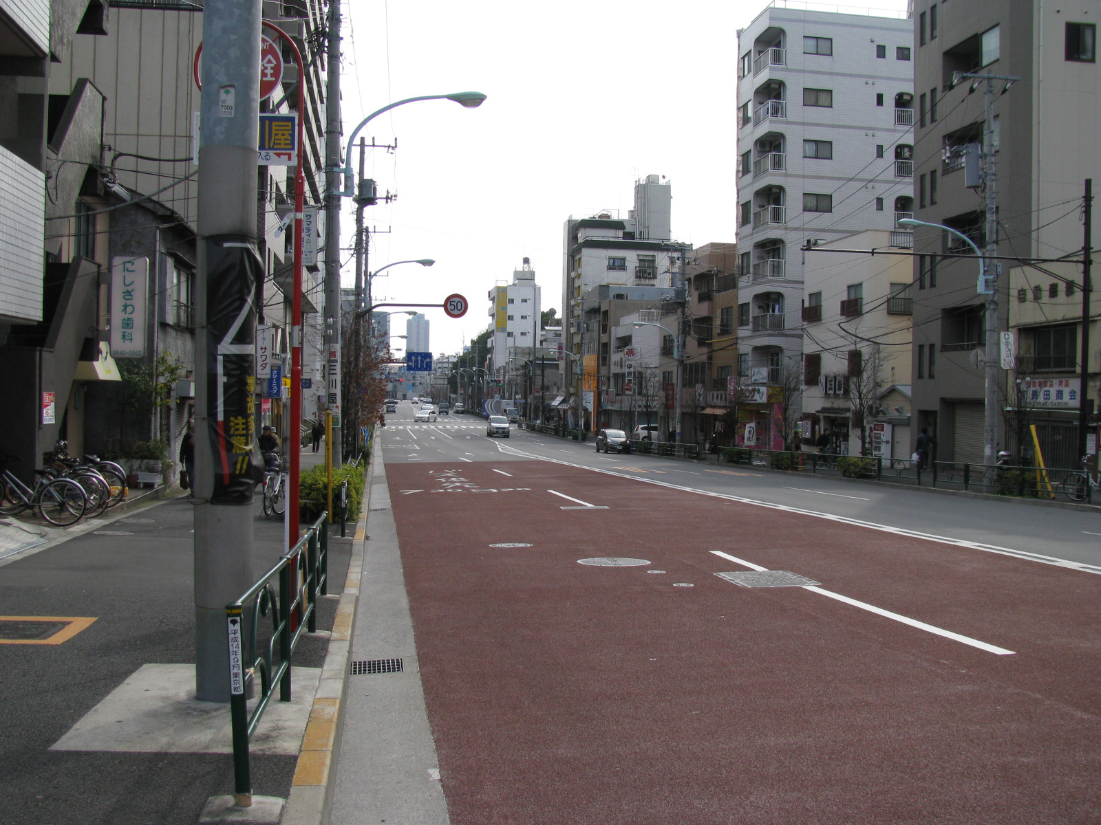 清澄白河駅上の清澄通りから門前仲町方面を見る、目の前の信号のある交差点は清洲橋通りとの交差点である。